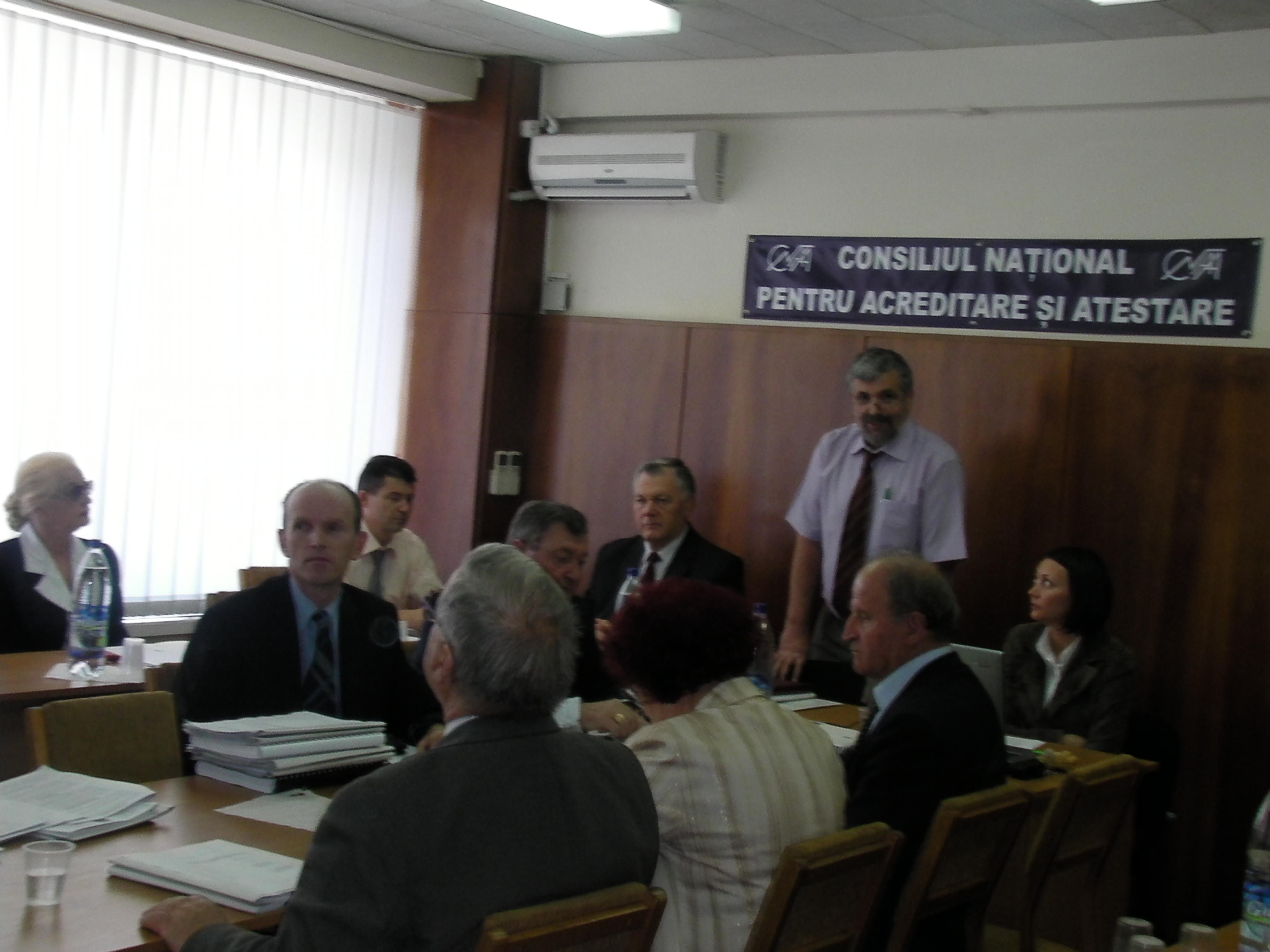 Sala de şedinţe a CNAA